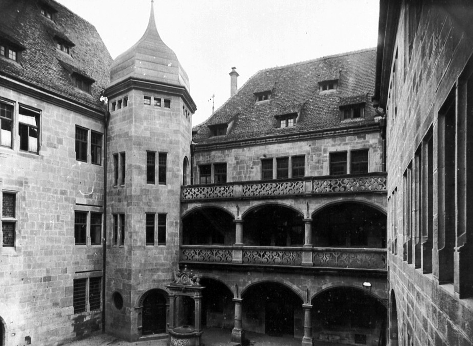 Rathausinnenhof in Heilbronn, before 1910